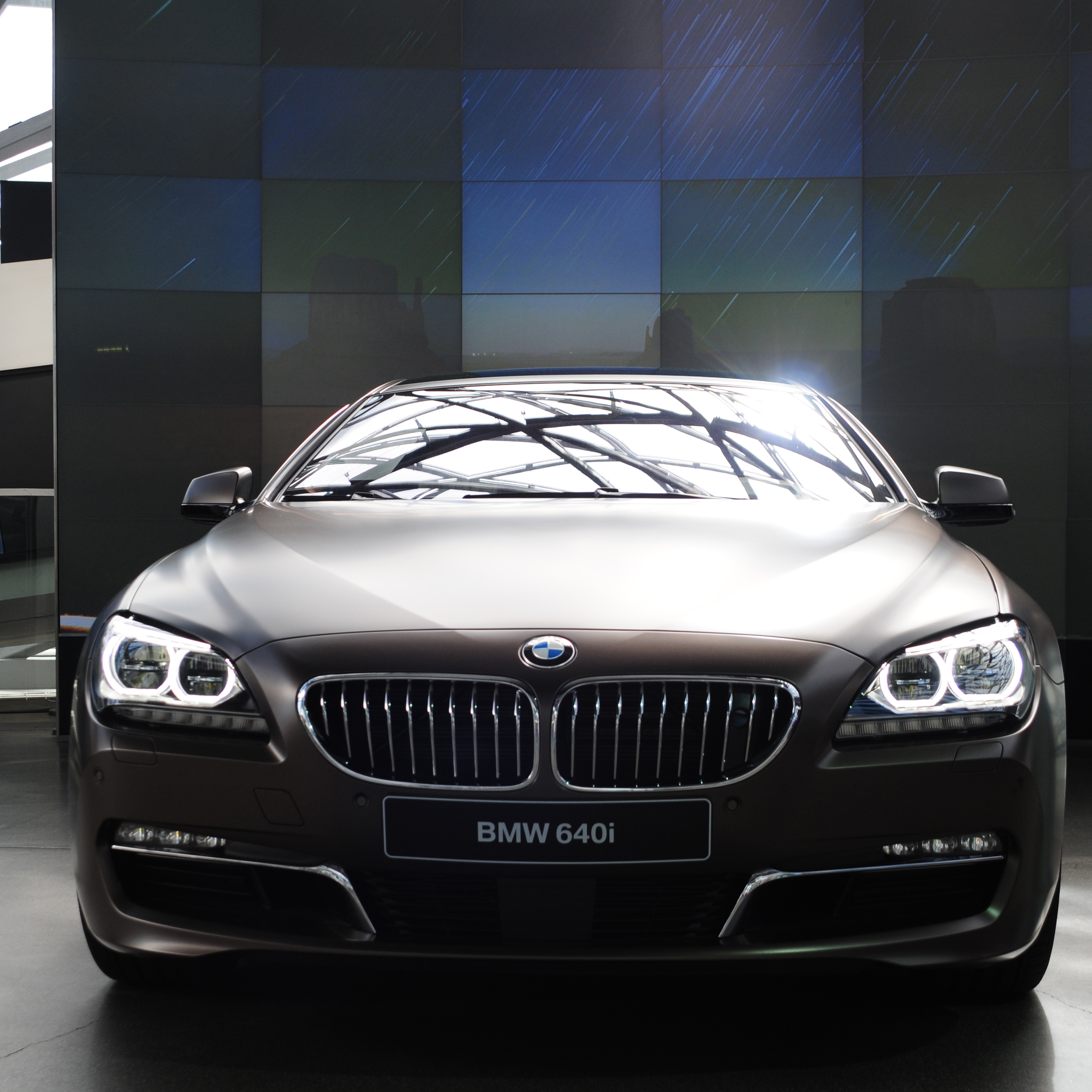 BMW-Welt, München Dieses Bild entstand während des Landtagsprojekts 2012 im Bayerischen Landtag